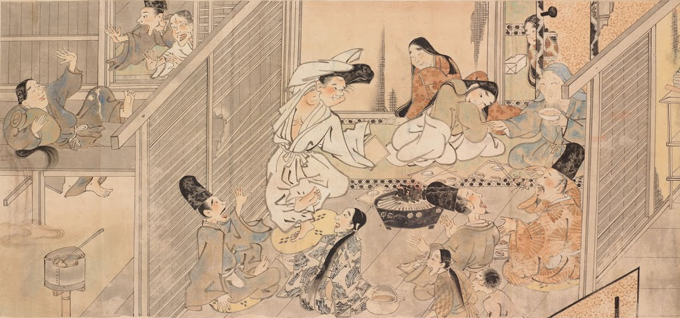 Histoire d'un peintre, emaki, Tosa Mitsuoki, XVIIe, Asian Art Museum de Tokyo. Copie de l’œuvre du XIVe détenue par la maison impériale.